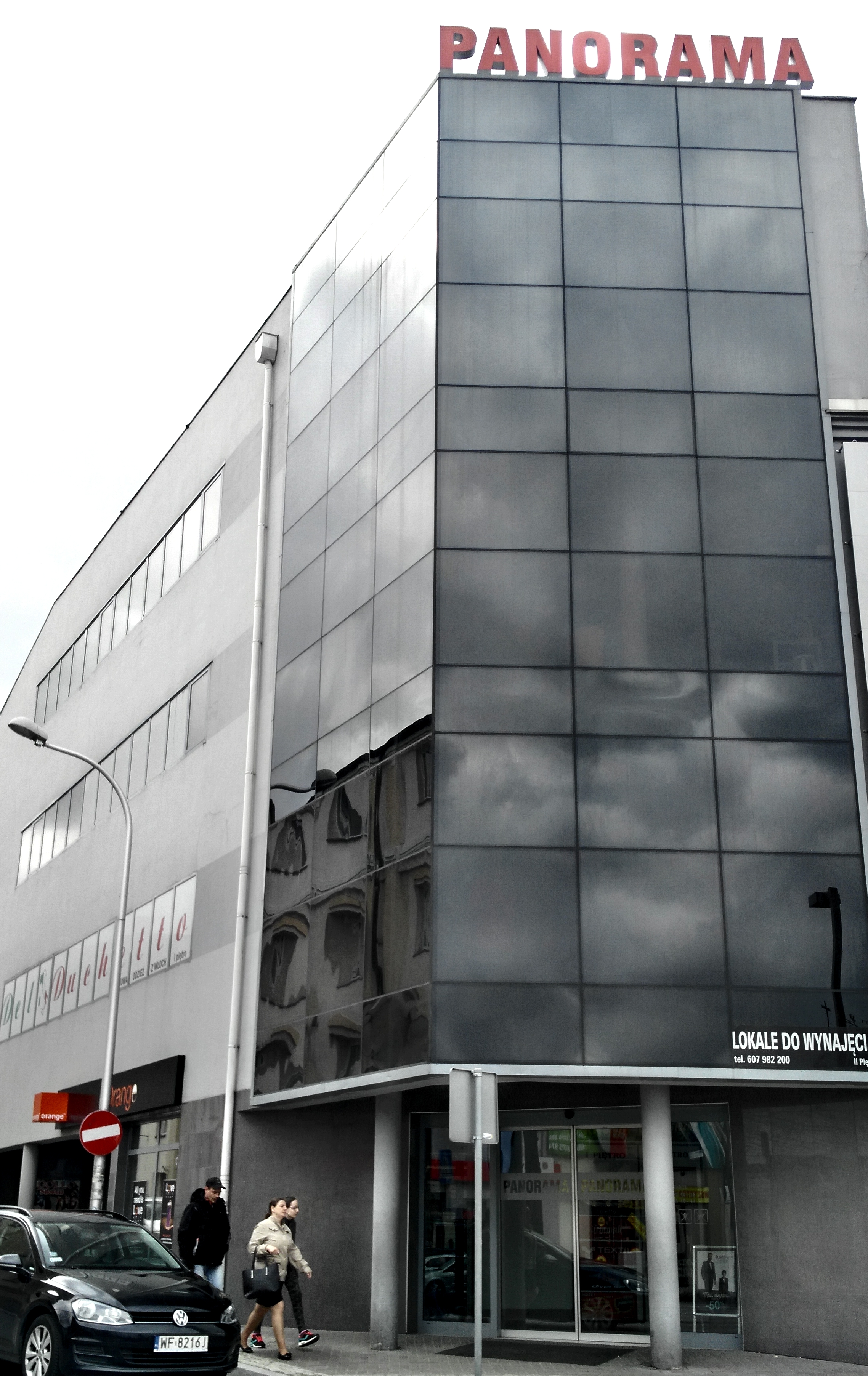 Dom Handlowy Panorama w ścisłym centrum miasta przy placu Kościuszki